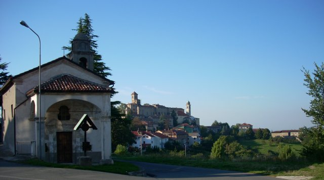 Panorama di Morsasco (AL) dalla chiesetta di San Pasquale